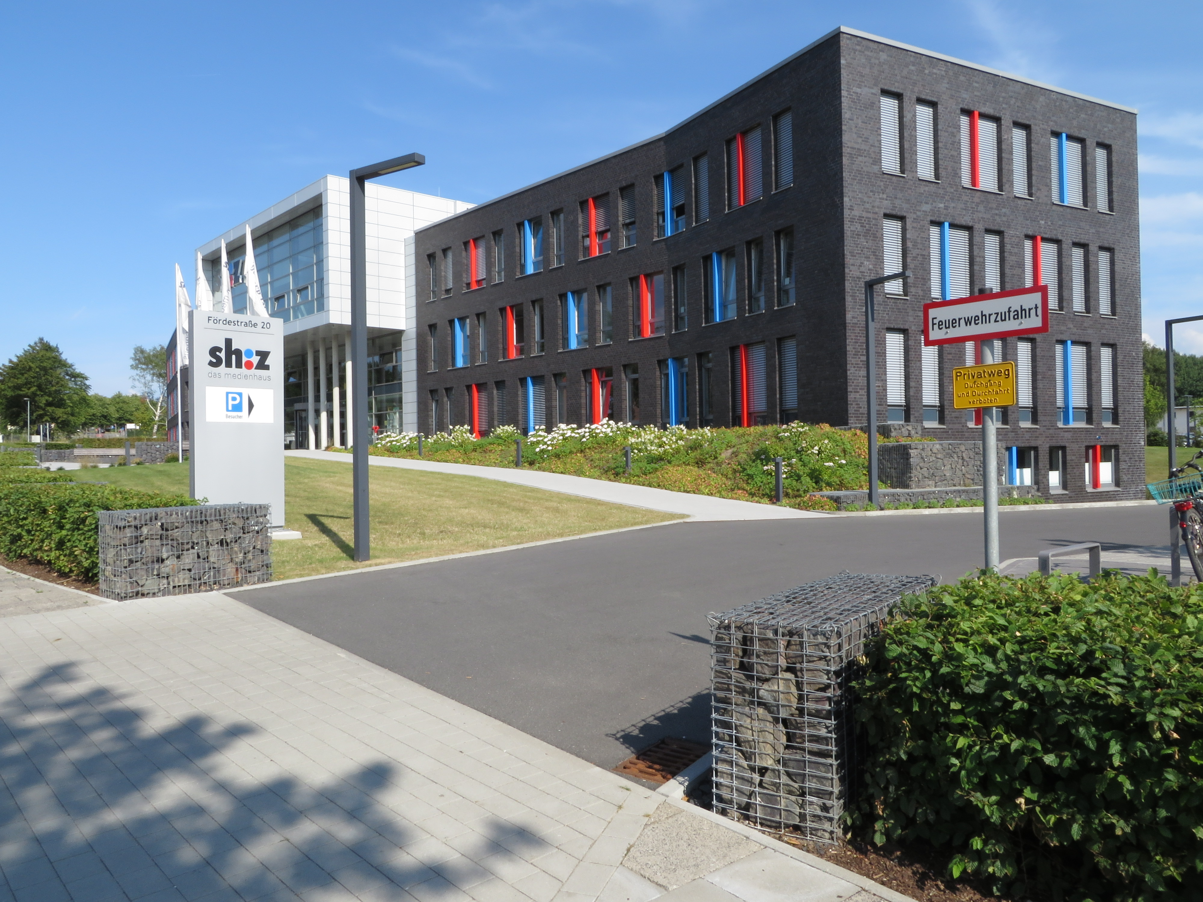 Sitz des Schleswig-Holsteinischen Zeitungsverlages in (Flensburg-Mürwik Juli 2014)